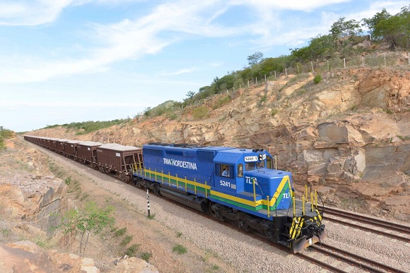 Locomotiva EMD SD40-2 5241-1Transnordestina Logística S/A, em Salgueiro PE.